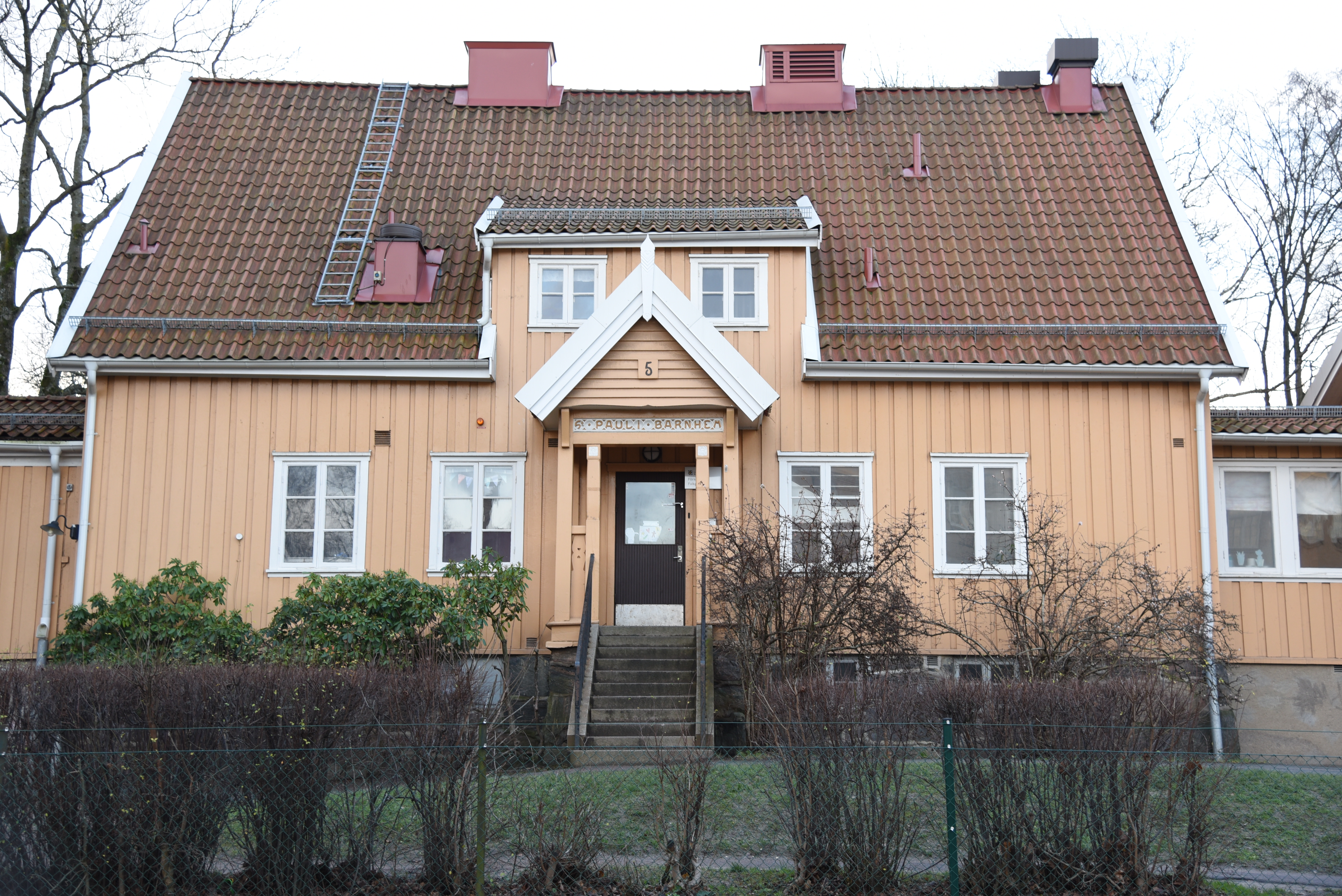 Sankt Pauli barnhem på Falkgatan 5 i Olskroken i Goteborg. Byggnadsår 1913. Arkitekt Gustaf Ljungman